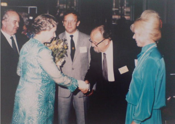 Toby E. Rodes, deutscher Kommunikationsexperte und Autor.